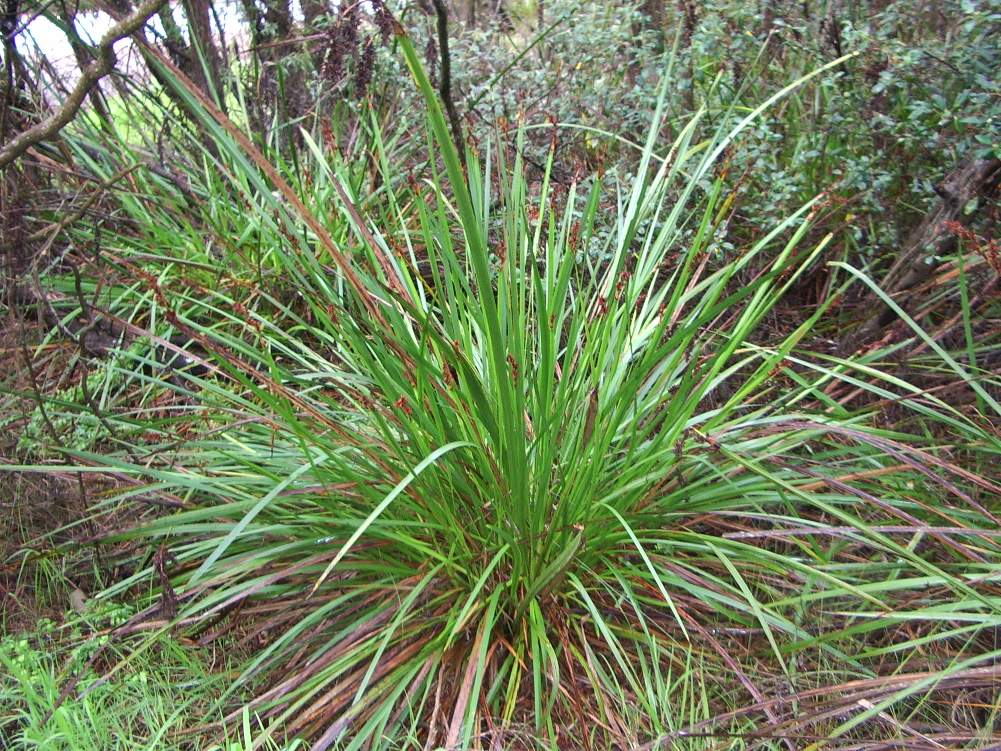 Sword Sedge Lepidosperma gladiatum